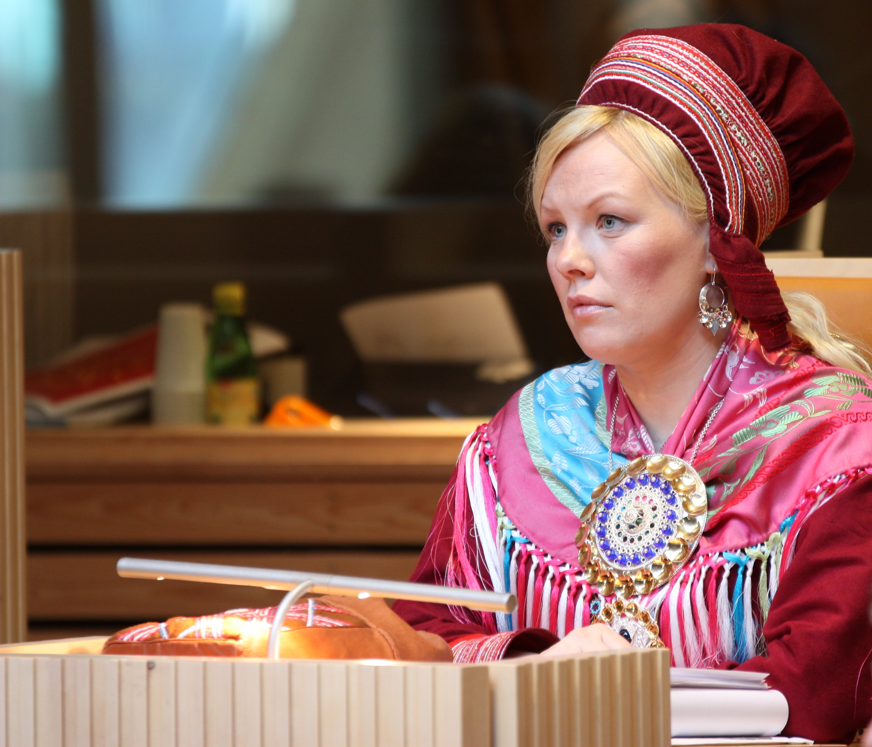 Leder for partiet Árja og medlem av plan- og finanskomitéen. Foto: Sametinget..